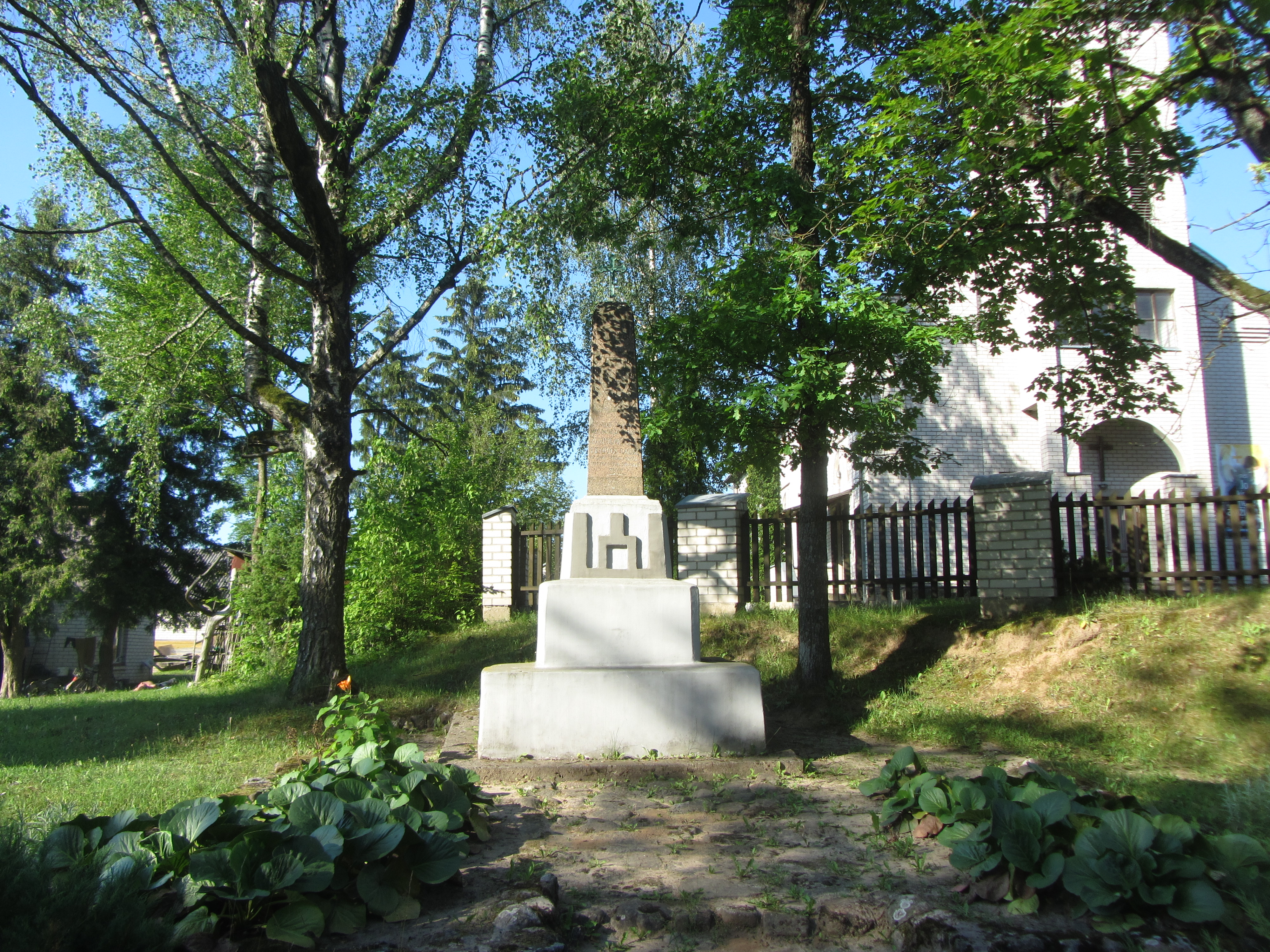 Ryliškiai, Lithuania